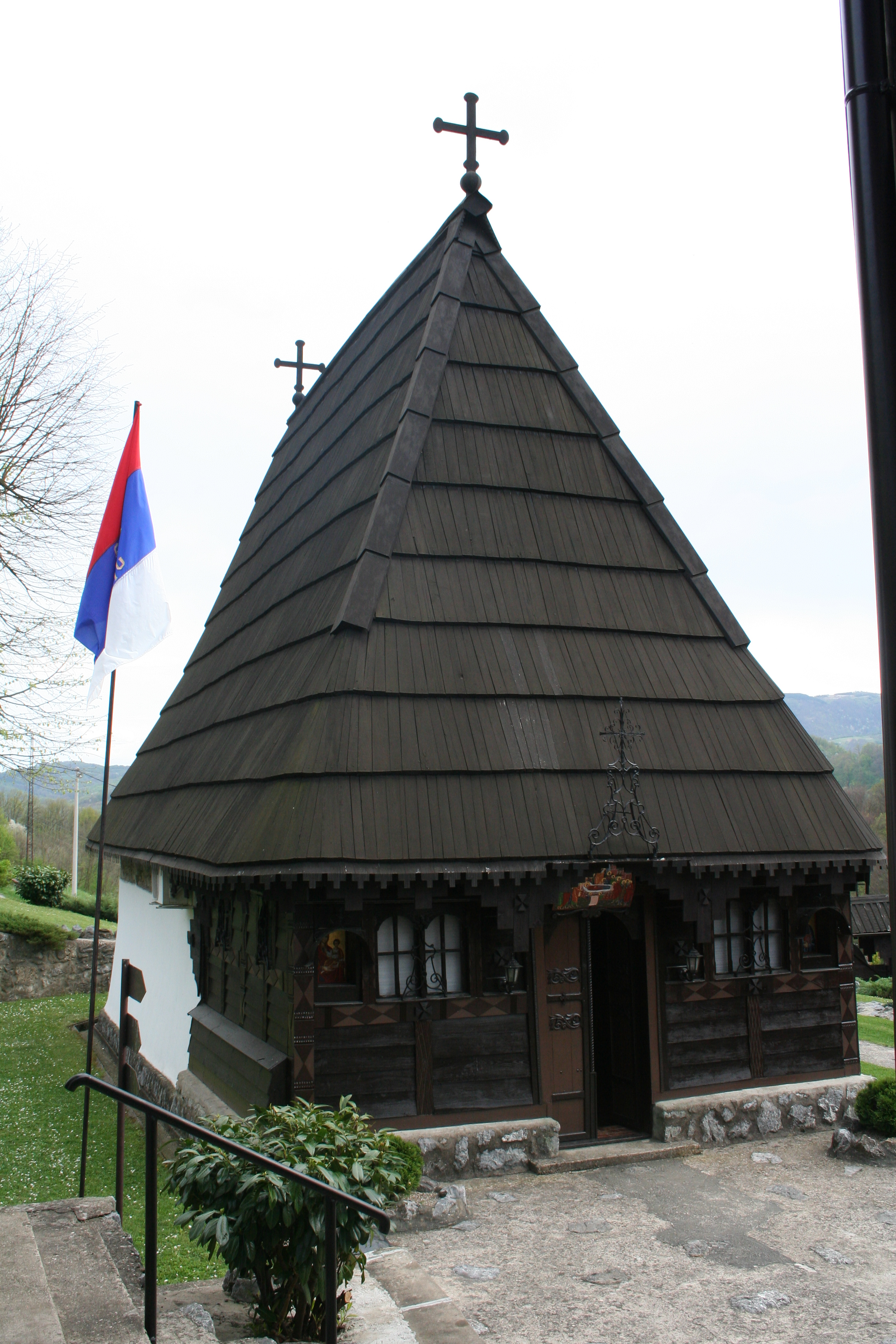 Crkva Uspenja Presvete Bogorodice, Dobri potok Krupanj